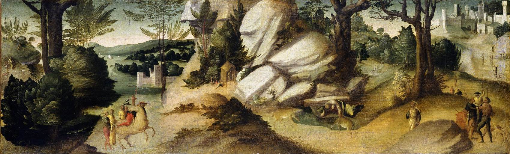 Giovanni di Lorenzo Larciani - Paesaggio - Washington